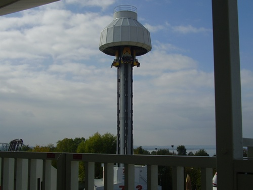 Space Vertigo picture, Gardaland